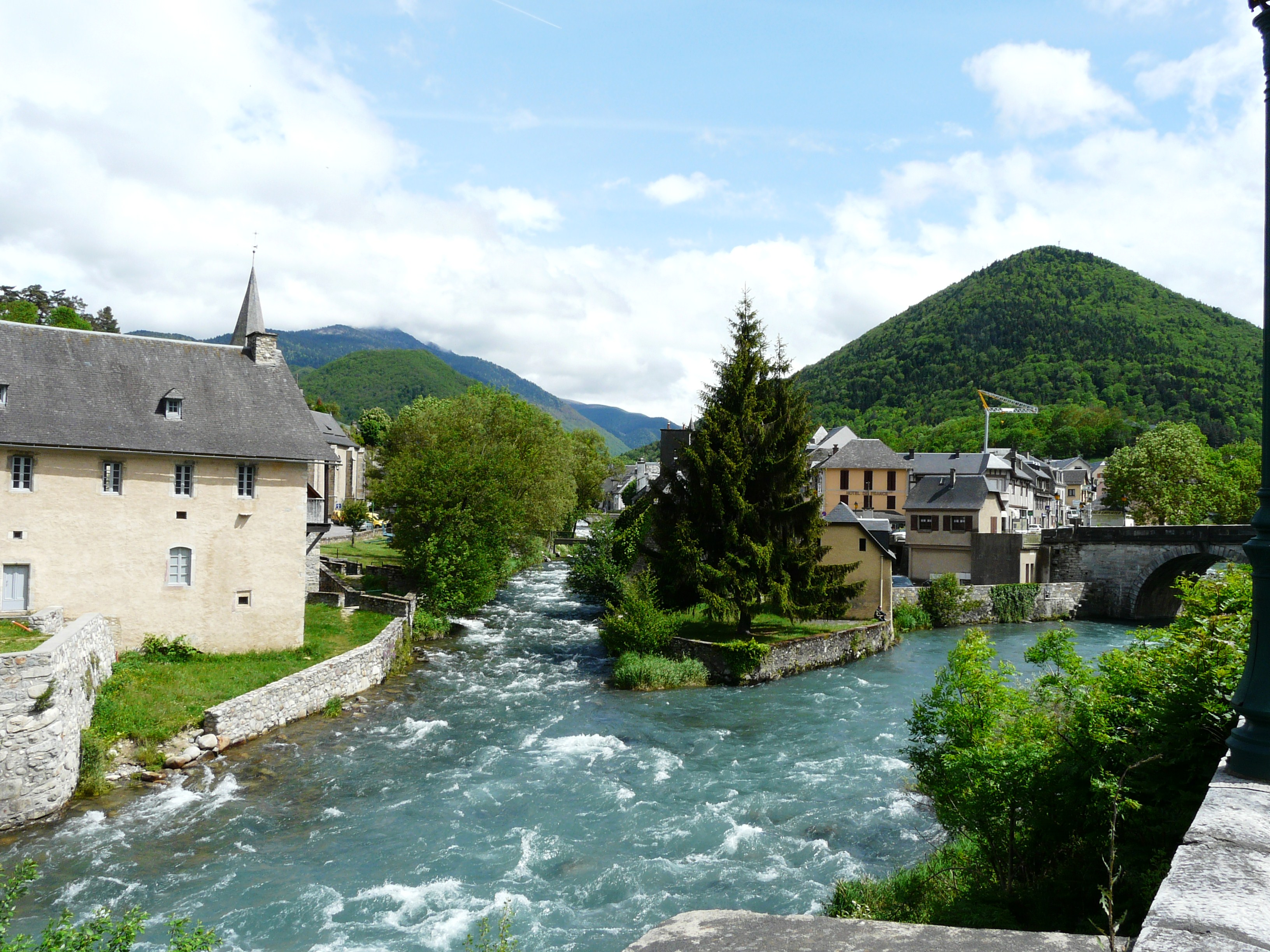 Le confluent de la Neste du Louron et de la Neste d'Aure qui prend alors le nom de Neste, Arreau, Hautes-Pyrénées, France.